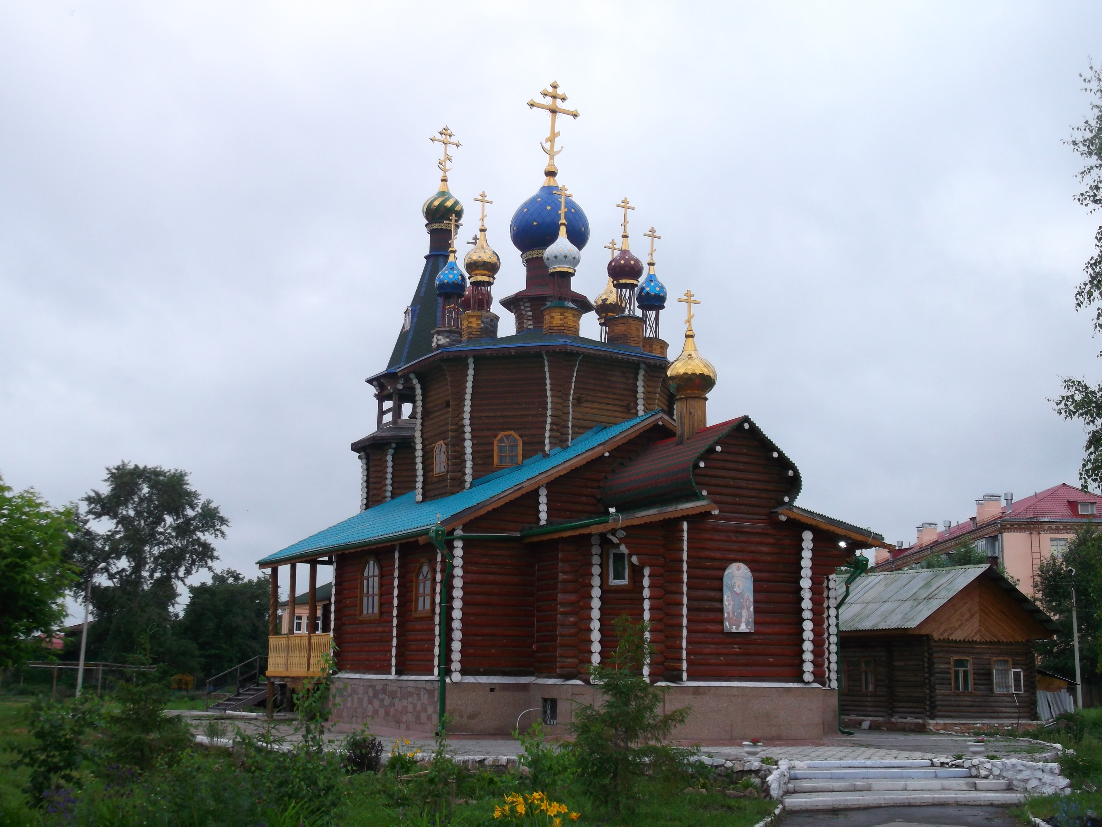 г. Катайск